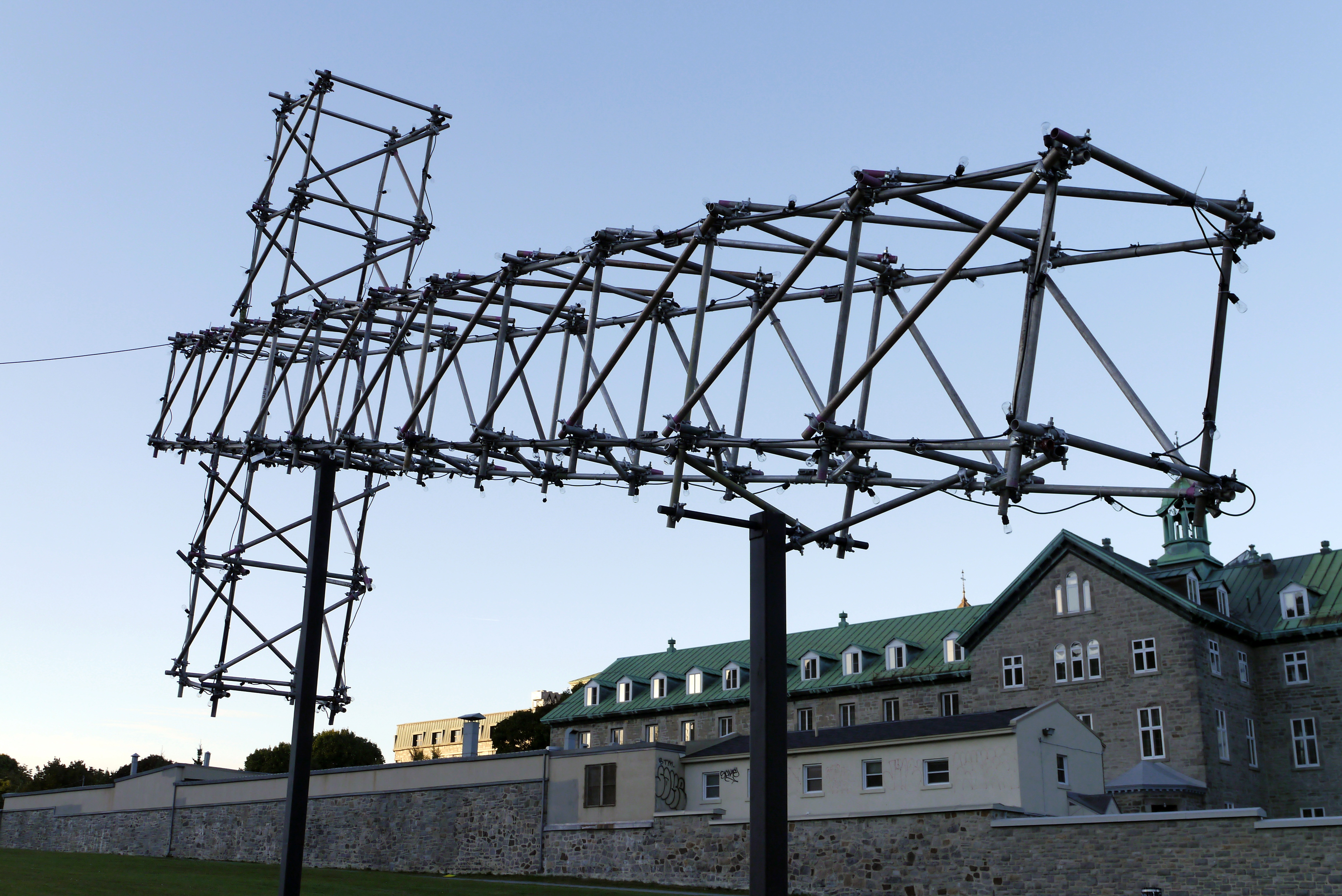 Parc Jeanne-Mance, Montréal En 1976, l’œuvre, à peine achevée, fut tout de suite démolie en même temps que toutes les autres œuvres de l’exposition Corridart, l’exposition-phare des Jeux Olympiques de Montréal. Réplique de la croix posée sur le mont Royal, celle-ci reposait sur son flanc. Dans le cadre d’une rétrospective majeure sur Pierre Ayot tenue dans plusieurs lieux à Montréal, Nicolas Mavrikakis, commissaire et critique d’art, a souhaité réactualiser cette œuvre, dont tout le monde a entendu parler, mais que personne n’a vue. C’est sans hésitation que Marthe Carrier et la Galerie B-312 se sont associés à ce projet. En tant que commissaires, nous nous sommes attardés aux différents enjeux que posait cette recréation. Le choix de l’emplacement retenu a été fait de manière réfléchie et cohérente avec l’esprit de l’œuvre. Pour respecter la vision de l’artiste, cette œuvre historique et mythique d’Ayot, projet unique et spécifique, doit être absolument installée aux abords de la montagne, dont elle tire son nom. Comme le voulait Ayot, la croix semblerait être venue se reposer quelques moments en bas de la montagne… La démarche d’Ayot était proche du pop art, mouvement qui citait des images connues de tous pour les réutiliser dans un contexte différent. Cette œuvre placée devant des bâtiments dont l’avenir est incertain, après plusieurs centaines d’années d’usage, prend bien sûr un sens supplémentaire. Que devons-nous faire de notre héritage culturel, patrimonial et religieux ? Avec cette recréation de l’œuvre d’Ayot, nous avons voulu permettre aux citoyens de réfléchir à cette question importante.